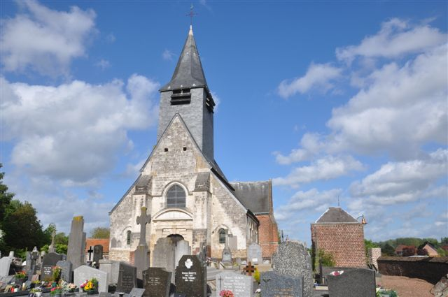 Eglise st Pierre